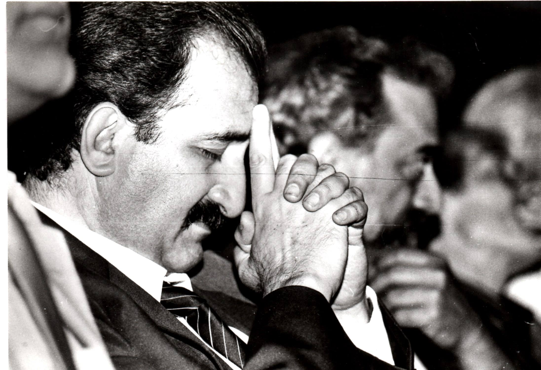 Խաժակ Տեր Գրիգորյան